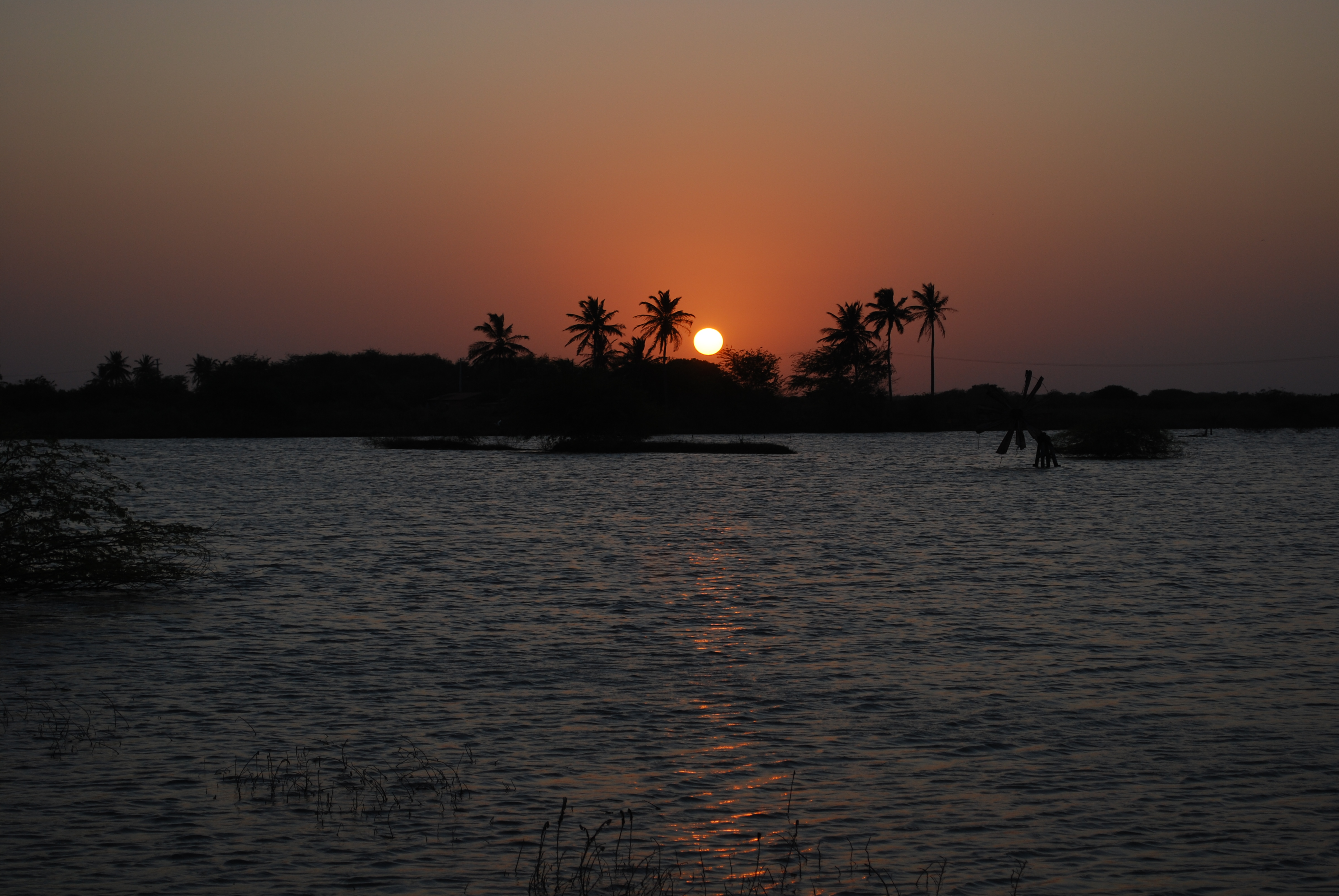 Pôr do sol na comunidade de Areia Alvas na cidade de Grossos, Rio Grande do Norte, Brasil.